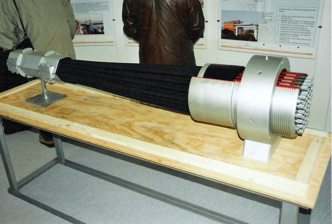 Autor: Benutzer:Klugschnacker, Stralsund, Rügenbrücke, Stahlseile für den künftigen Pylon, ausgestellt im Pyloneum (2005-11-12)